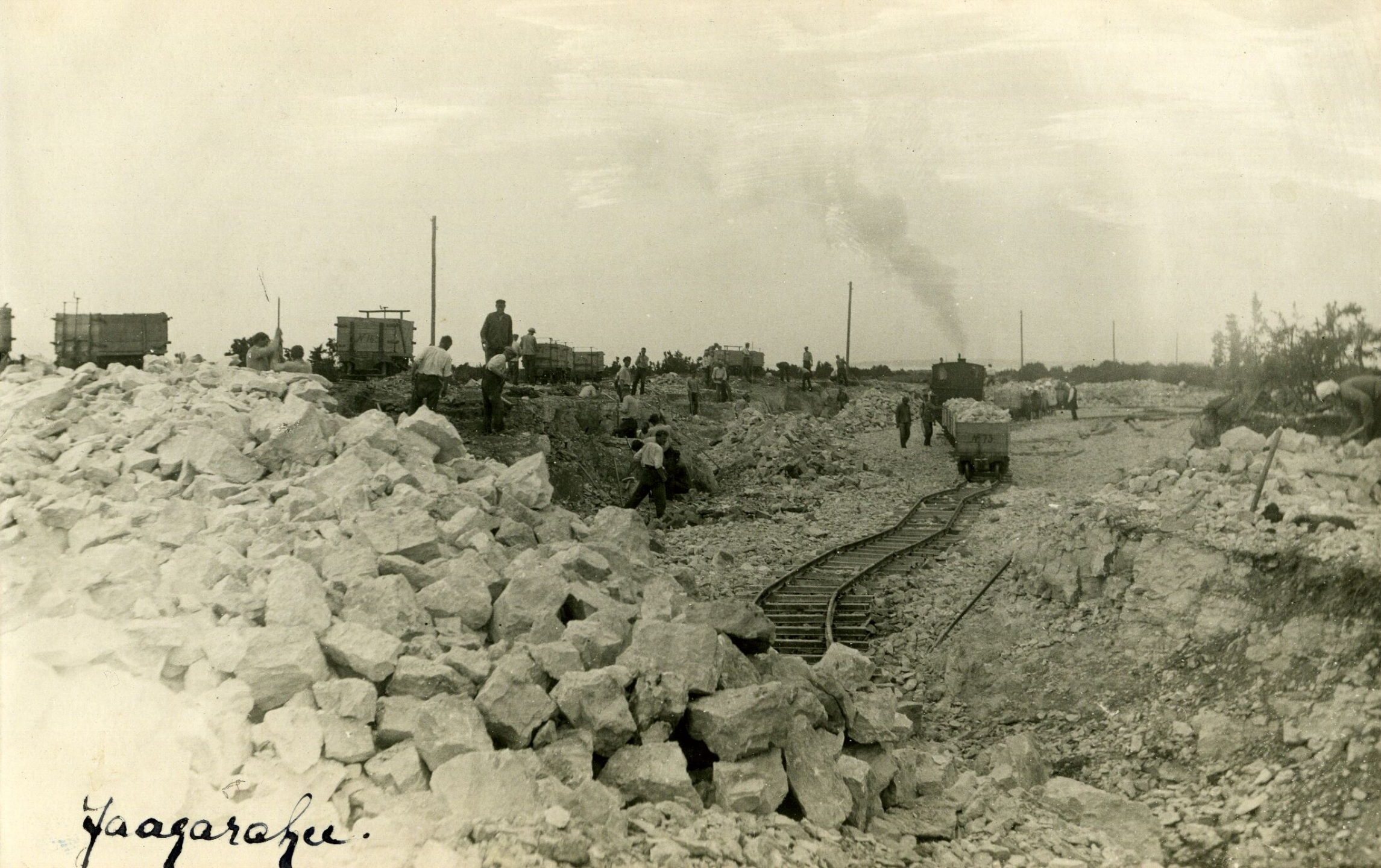 Jaagarahu karjäär Saaremaal